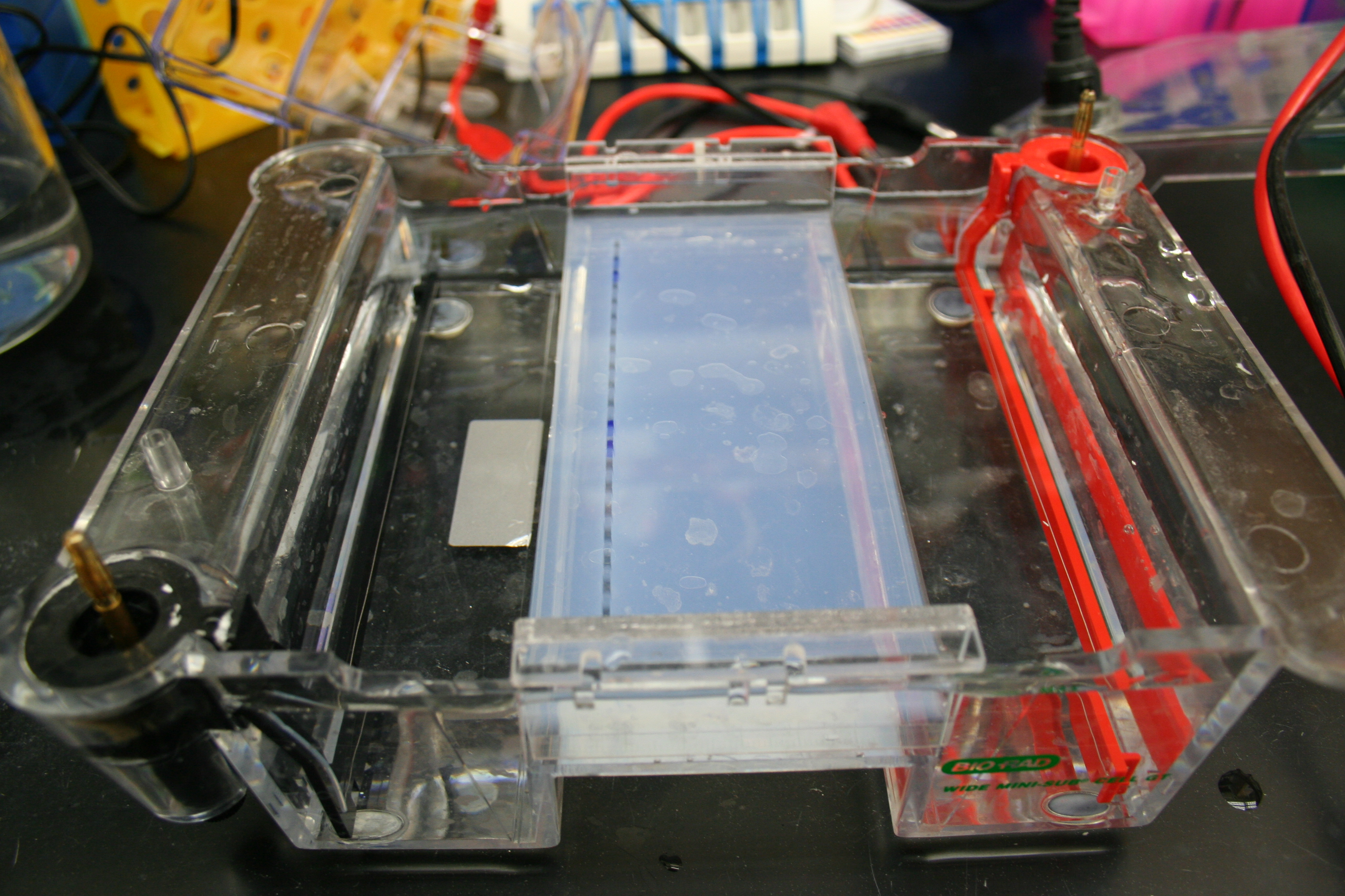 Agarose Gel Electrophoresis